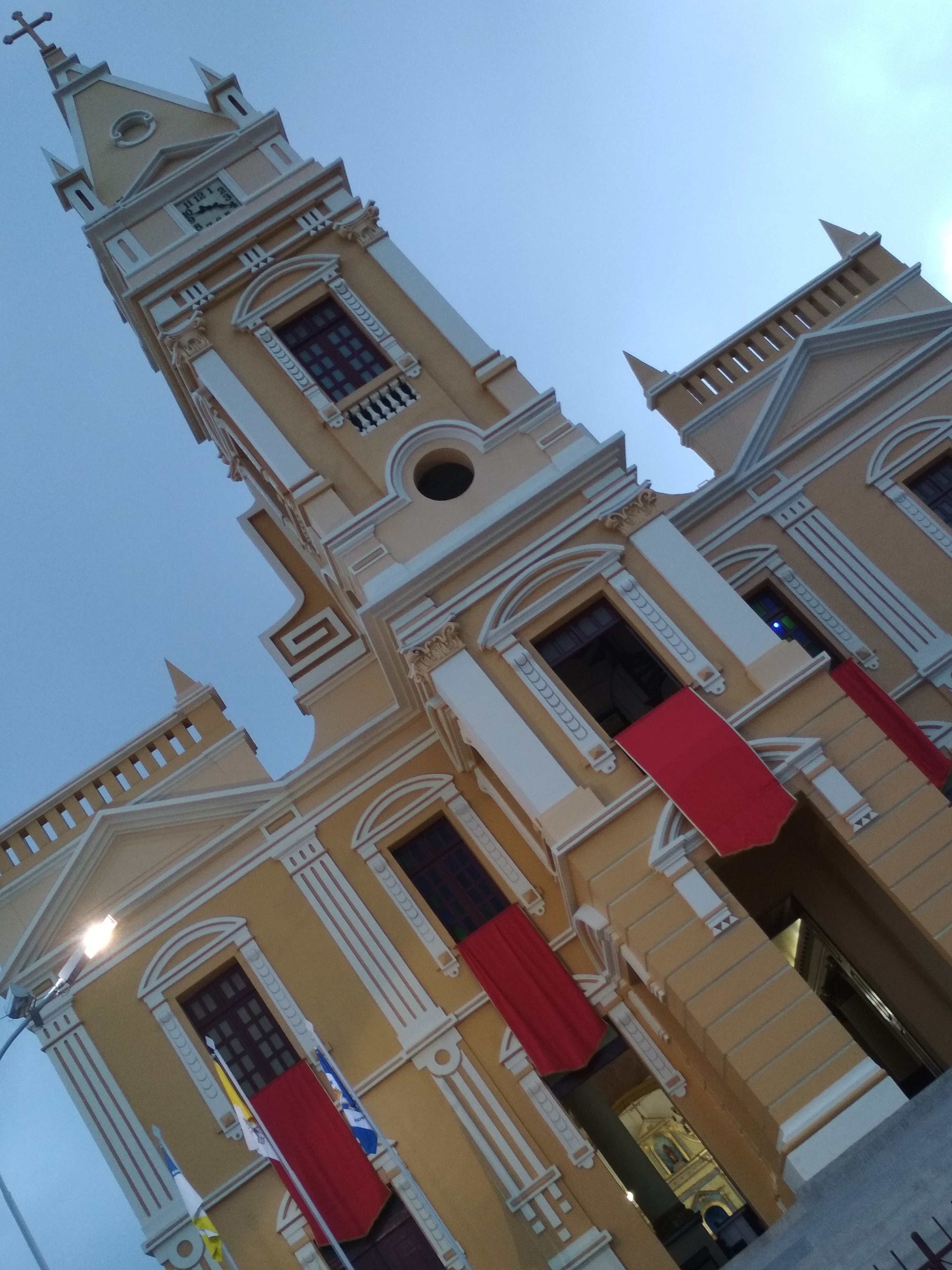 Paróquia da Catedral